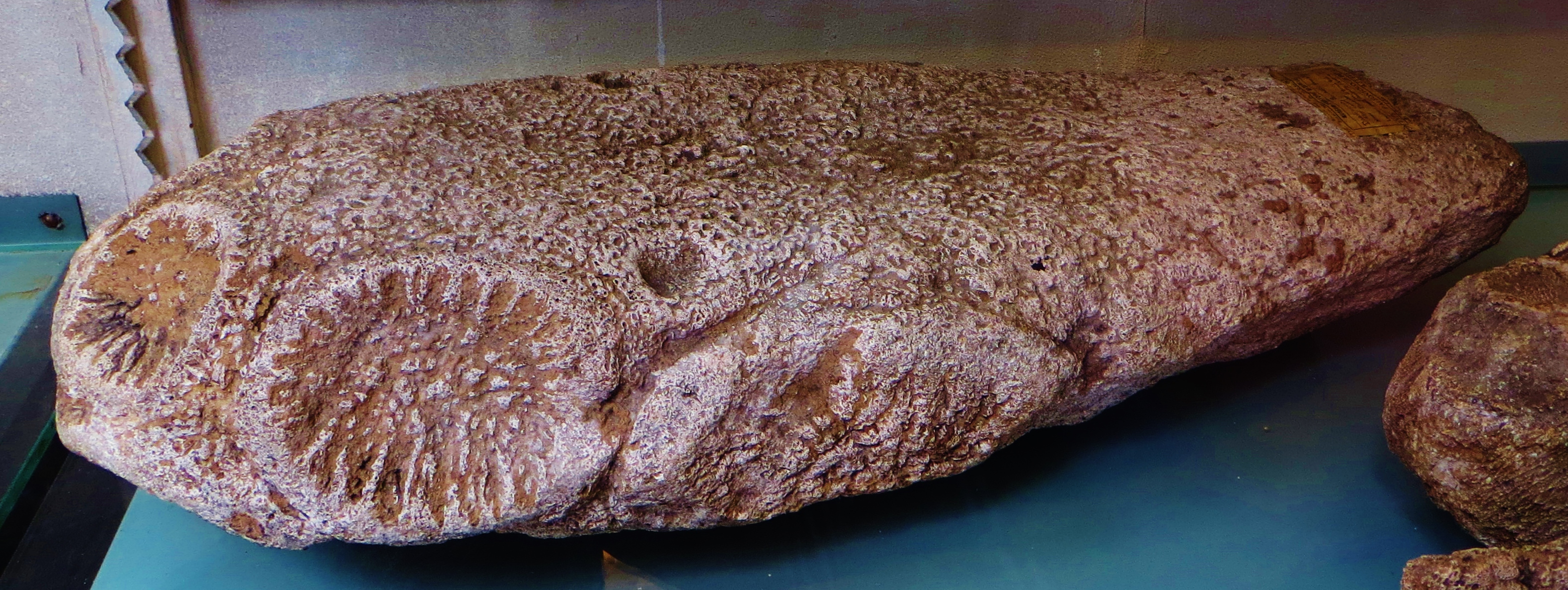 Fossil of Doedicurus, an extinct mammal- Took the photo at Musee d'Histoire Naturelle, Paris